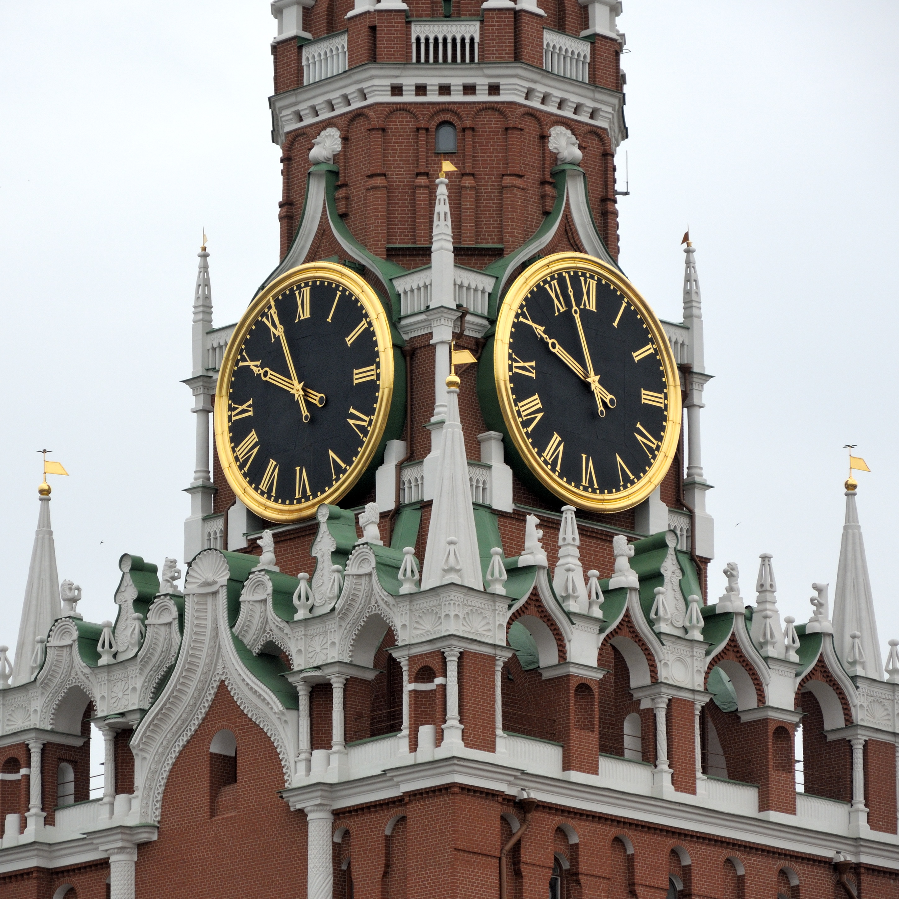 Спасская башня: Тверской, Центральный округ, Москва